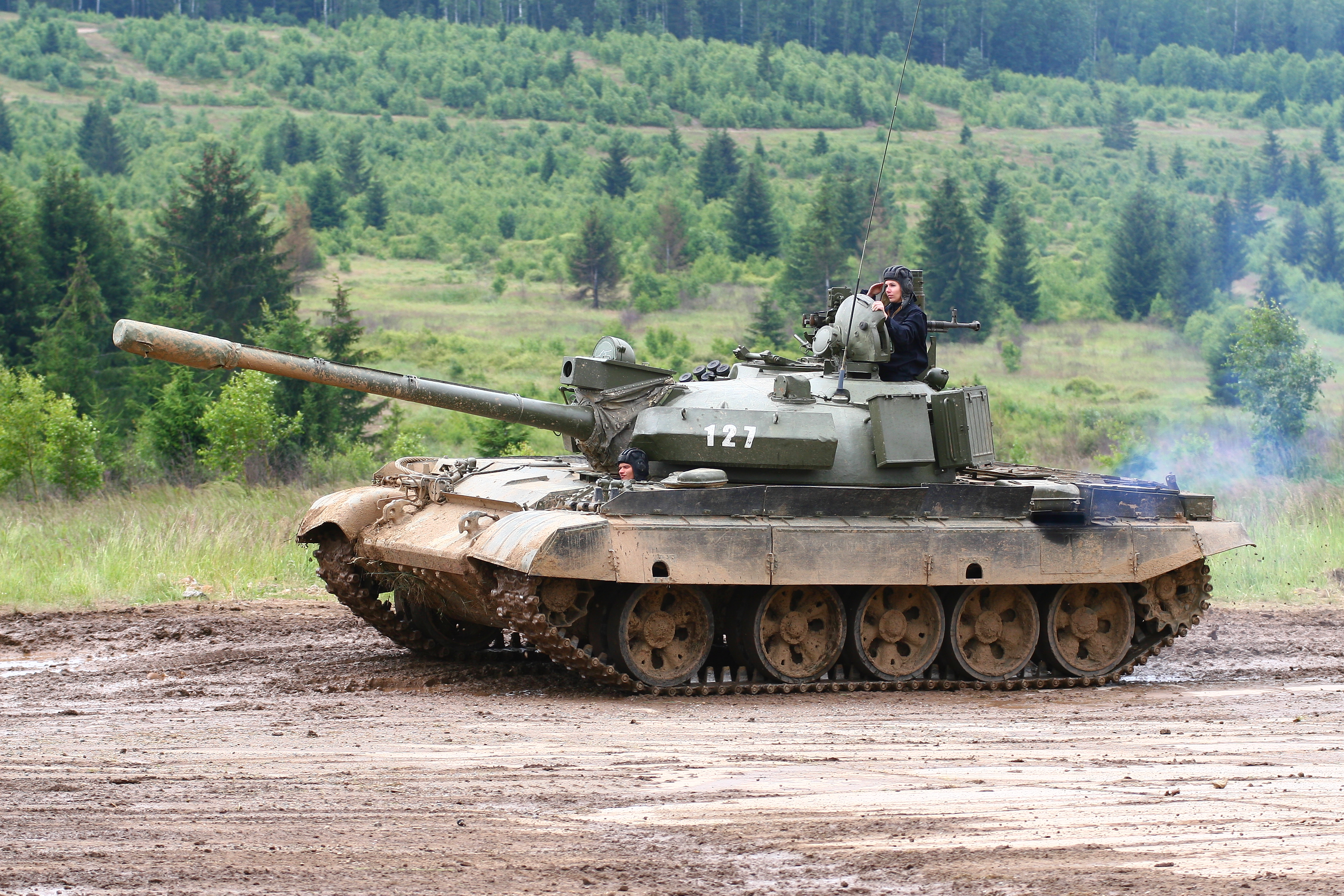 Vojenská technika zaznamenaná při dynamických ukázkách na Dni pozemního vojska BAHNA 2018, který pořádá Velitel společných sil a Nadace pozemního vojska AČR.